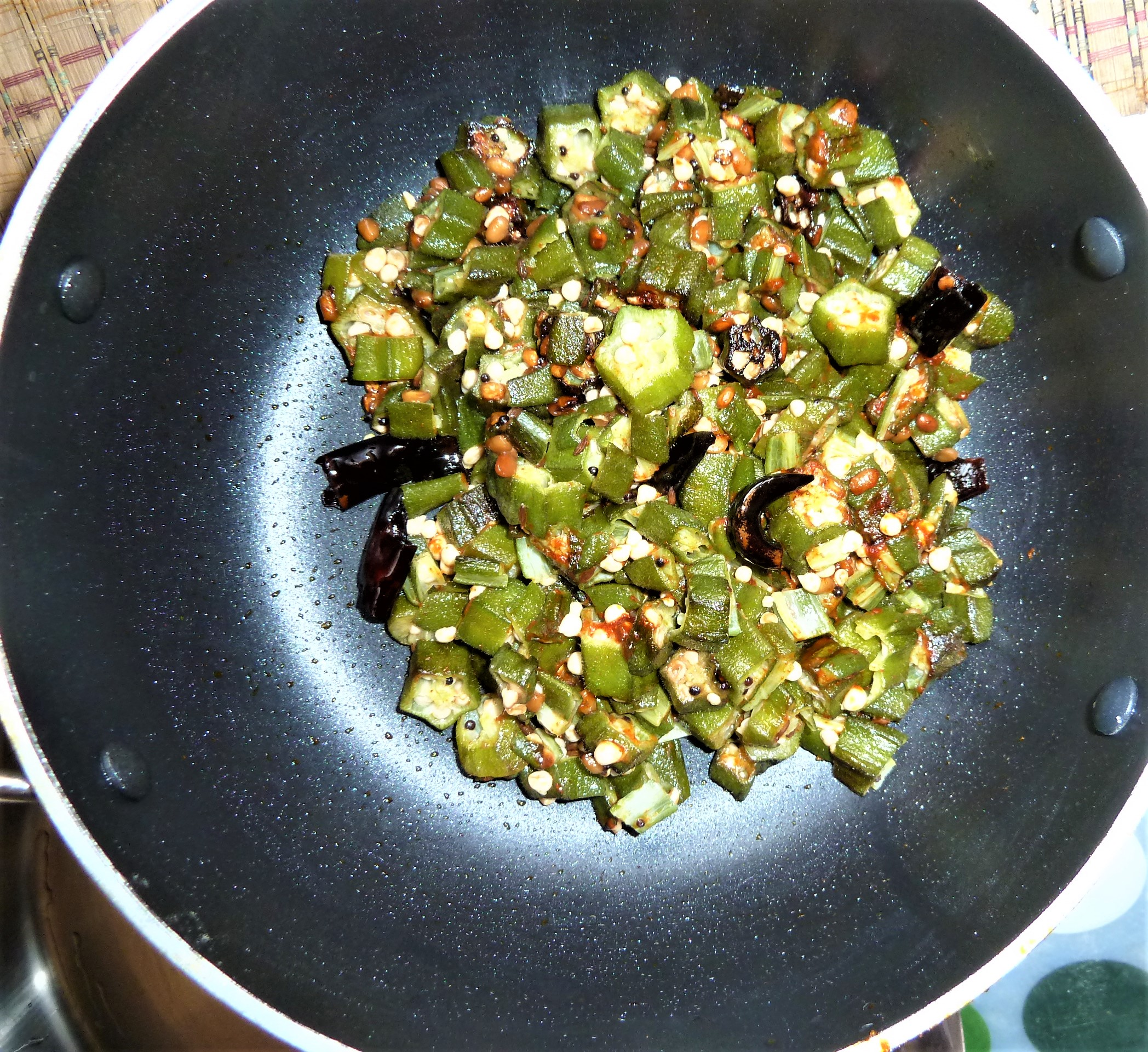 బెండకాయ పోపు కూర